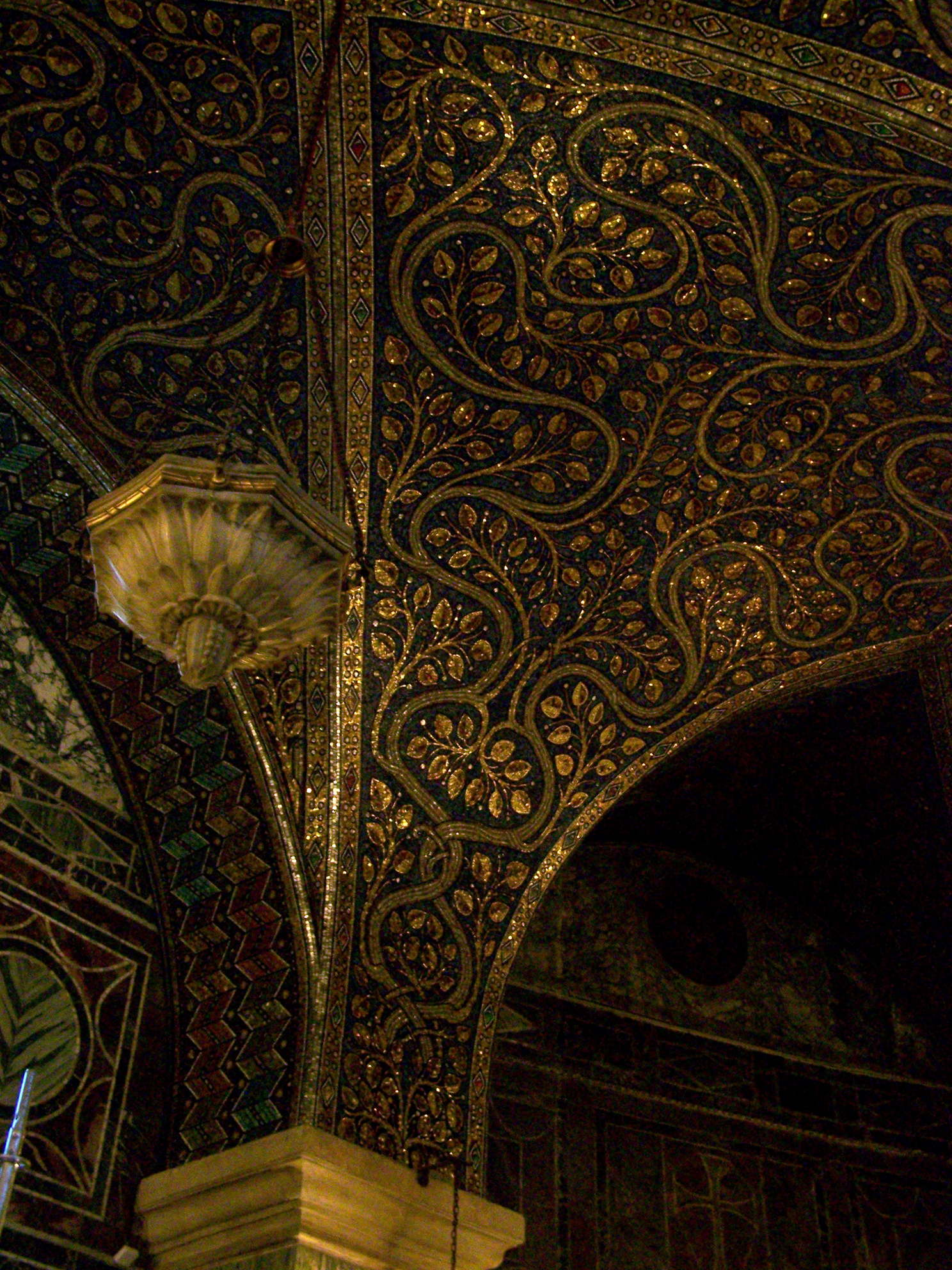 Catedral de Aachen. Abóbadas da passagem que circunda o octógono central.